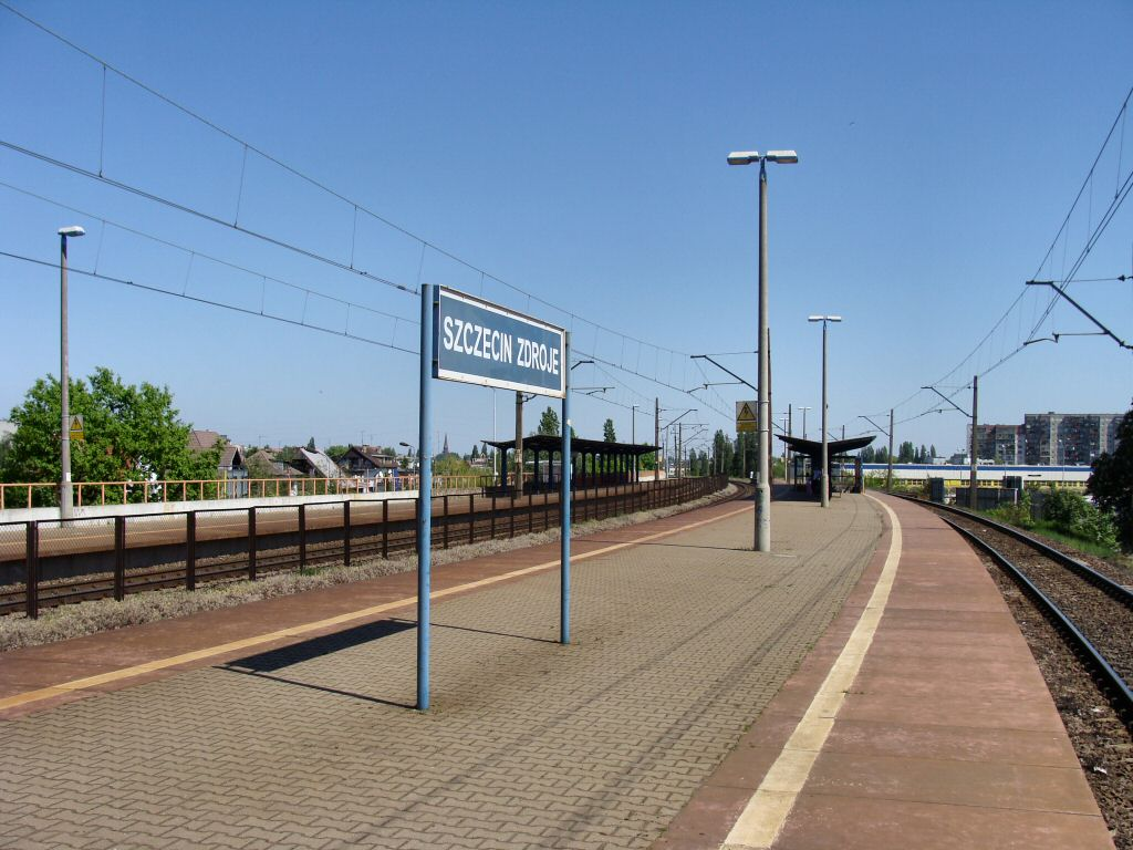 Przystanek kolejowy w Szczecinie Zdrojach.